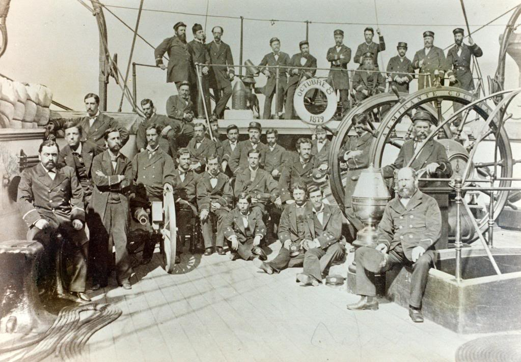 Oficialidad del fragata blindada Chilena Cochrane, durante la Guerra del Pacífico.